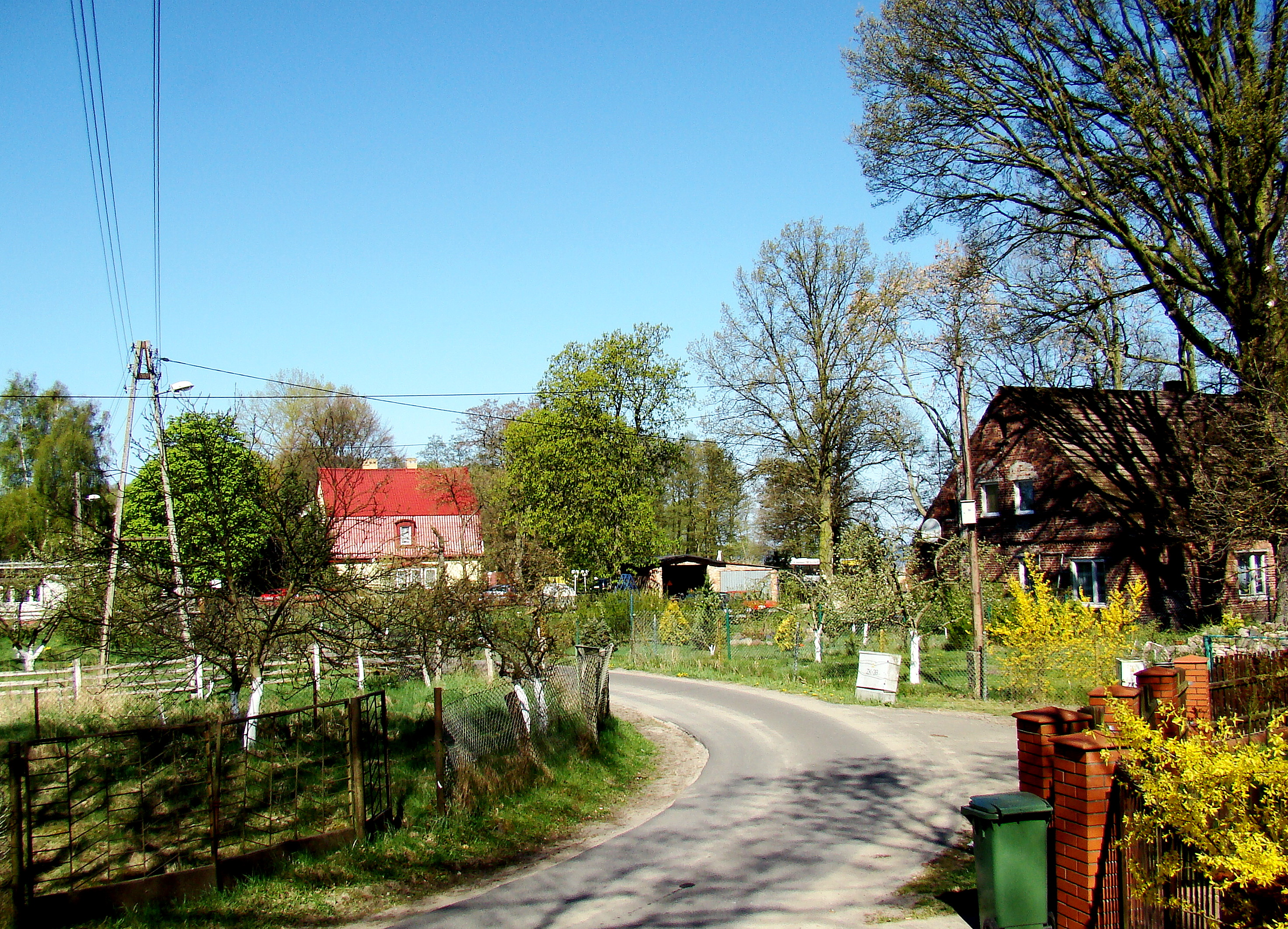 Popielewo (Gmina Nowe Warpno, Województwo zachodniopomorskie), Polska